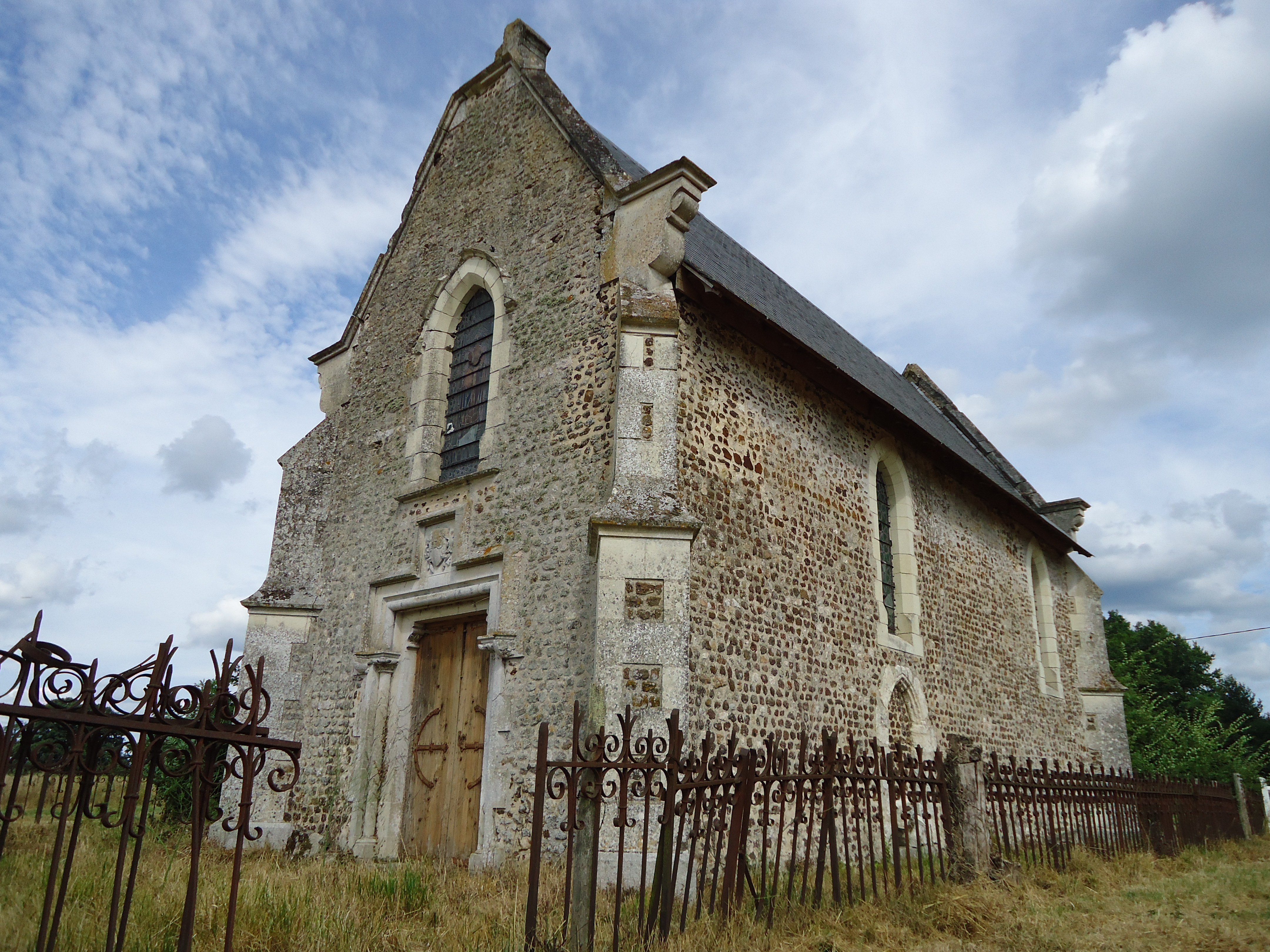 Chapelle-Saint-Martin - Roézé-sur-Sarthe (72)